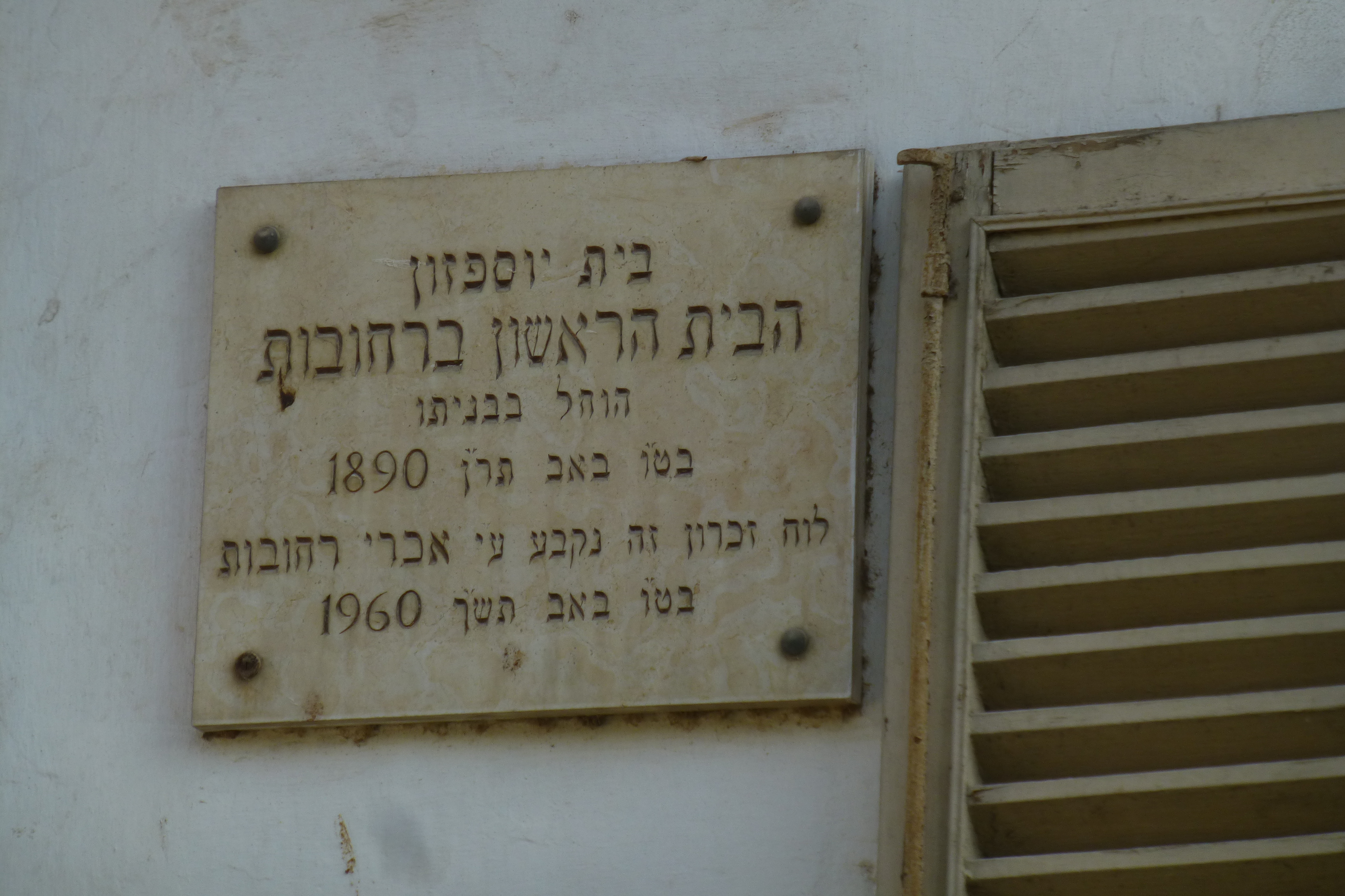 בית יוספזון - בית המגורים הראשון שנבנה ברחובות. הבניין הוא אב-טיפוס לבתים הראשונים במושבה מבחינת סגנון הבנייה, חומרי הבנייה, והחומה המקיפה אותו.